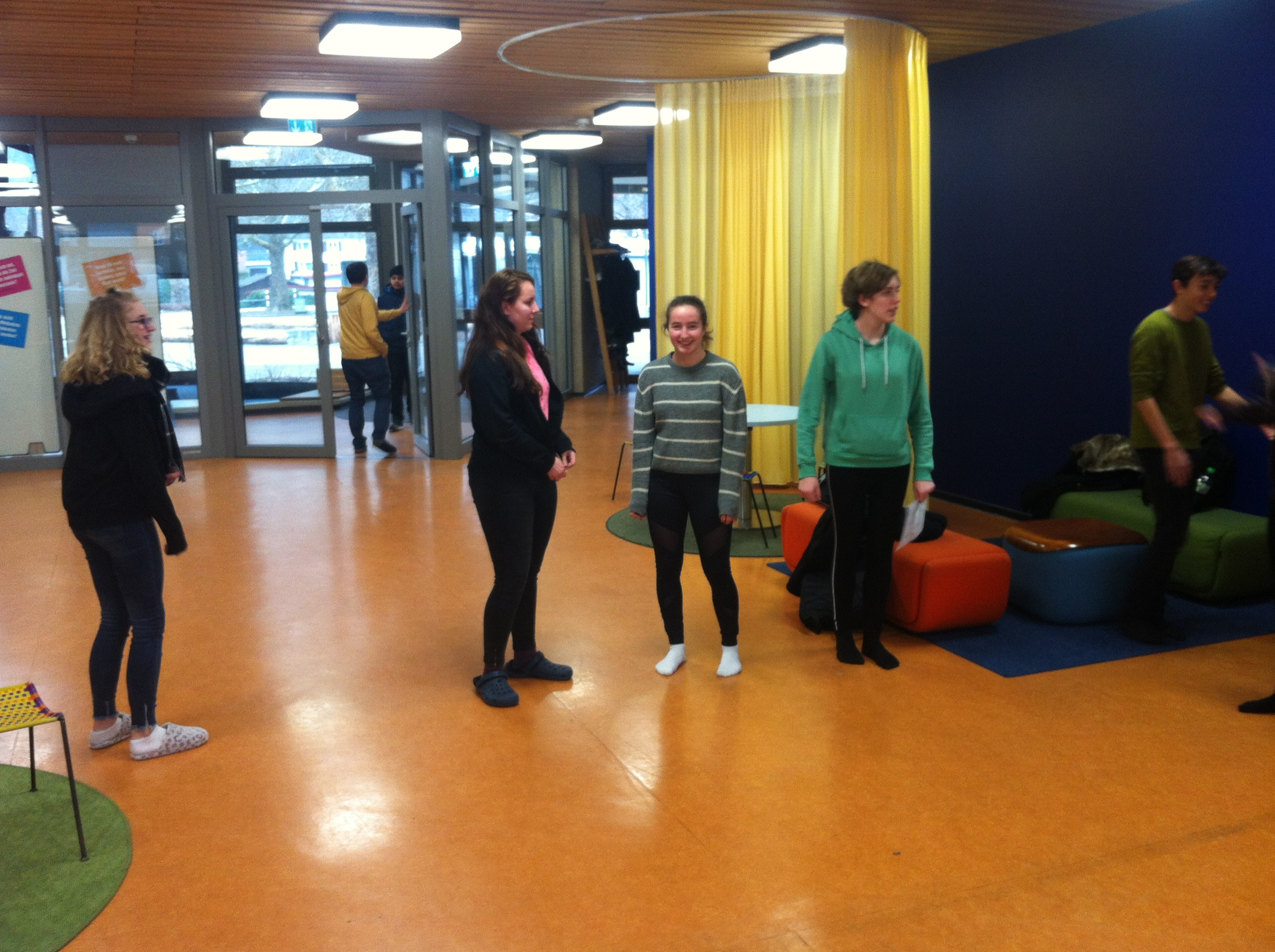 ASW Alemannenschule (Gemeinschaftsschule) in Wutöschingen im Landkreis Waldshut in Baden-Württemberg. (Lernpartner)